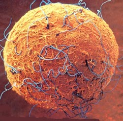 gameto femenino ovulo